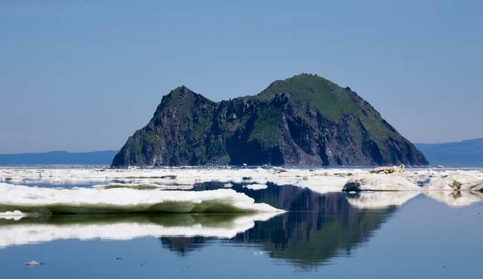 остров Святого Ионы